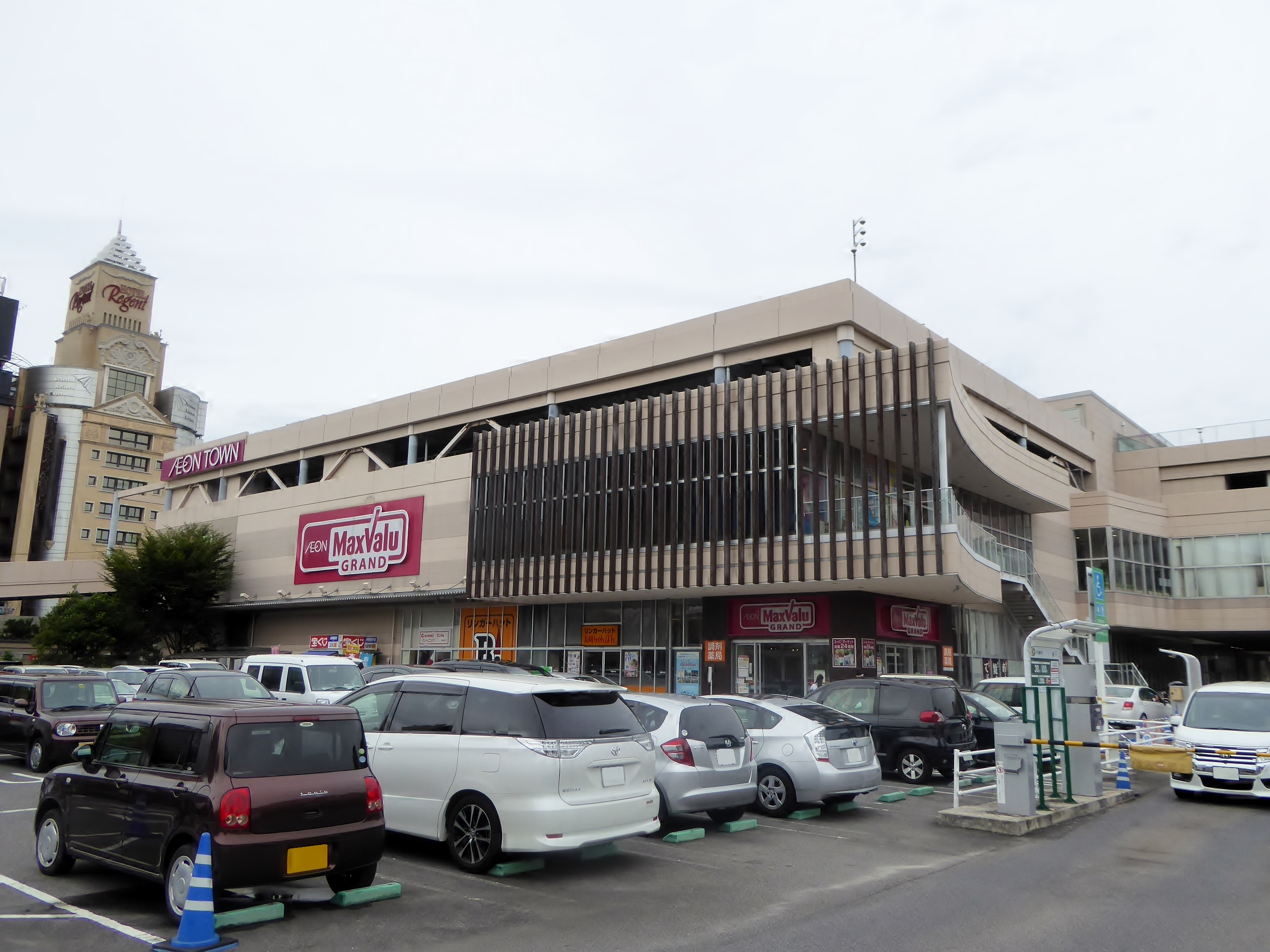 マックスバリュ千種店を撮影。